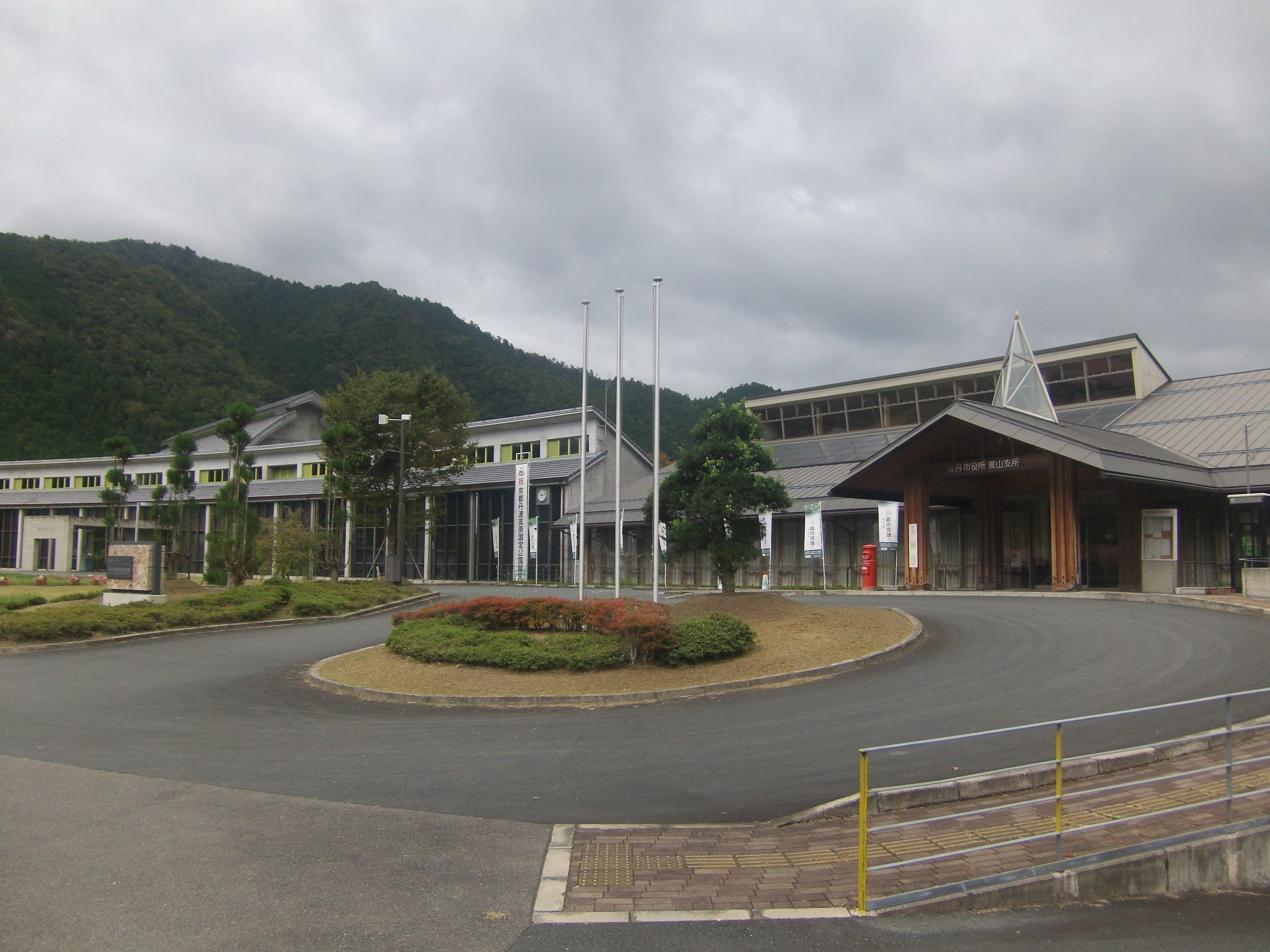 京都府南丹市美山町の美山文化ホール(左)、右は南丹市役所美山支所